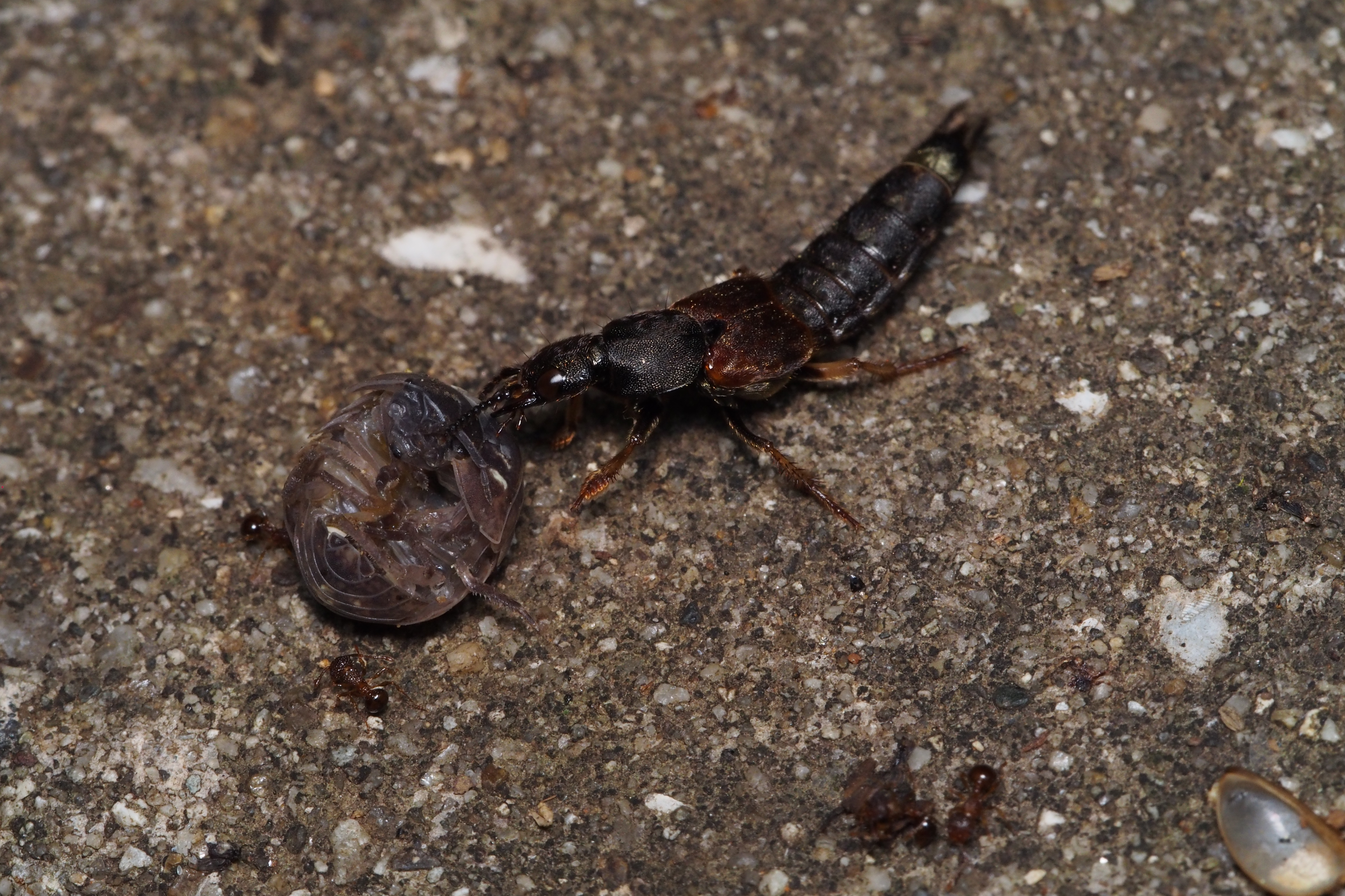 may be アカバハネカクシ.